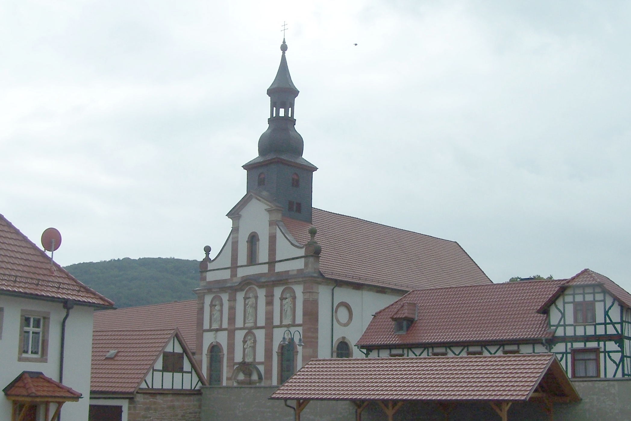 Dermbach